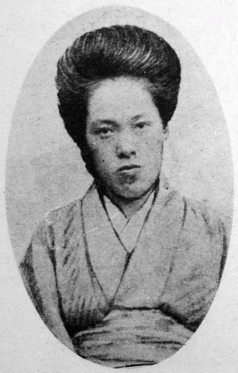 a Japanese woman 与謝野晶子 (Akiko Yosano)